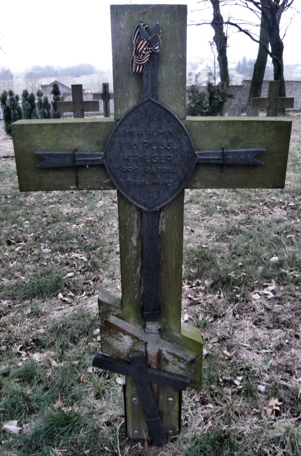 Boniewo - cmentarz z okresu I i II wojny światowej.